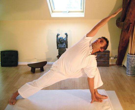 Yoga postures Parshvakonasana